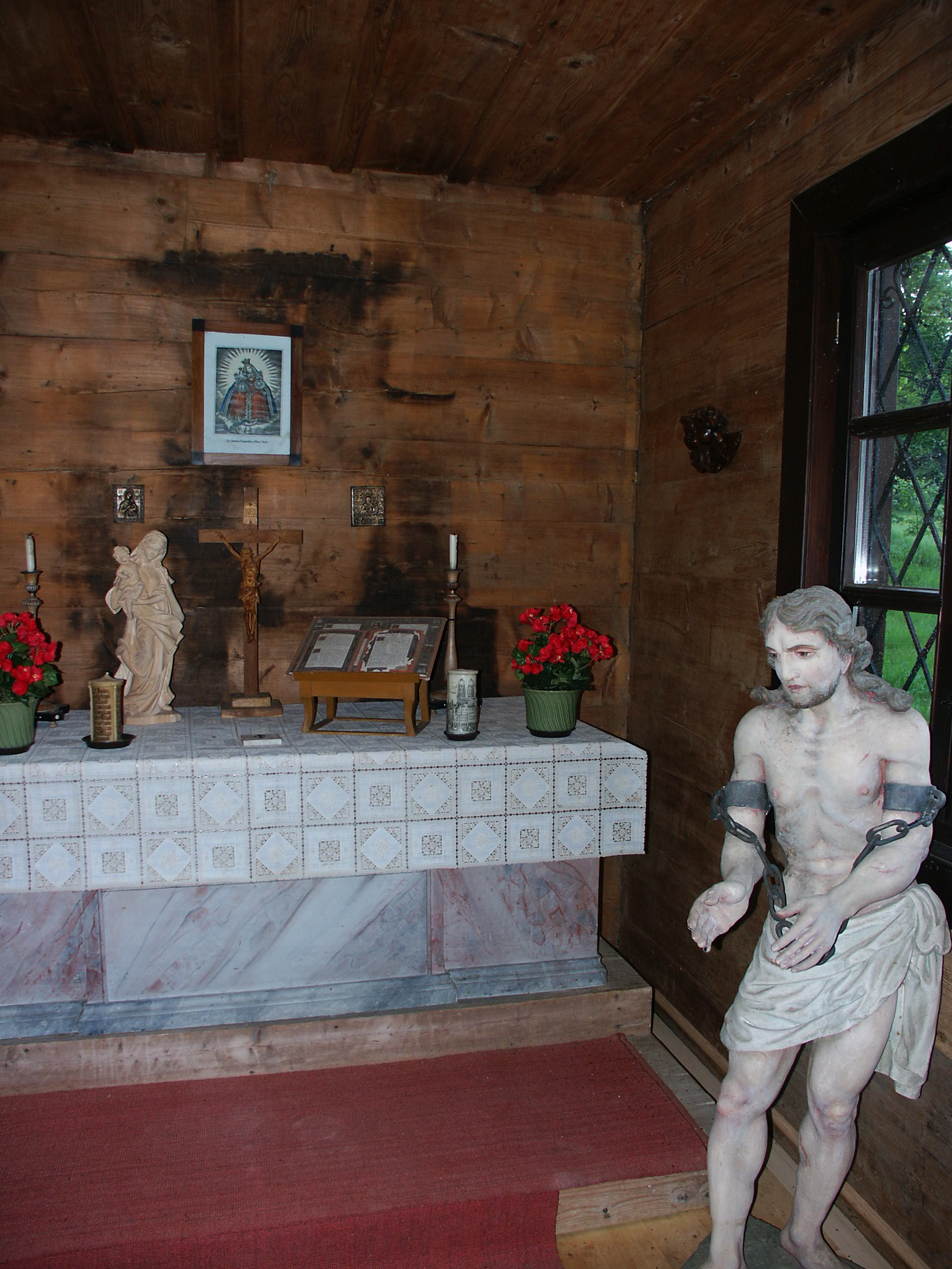 Kapelle auf der Ödwies (1030m) in der Gemeinde Achslach